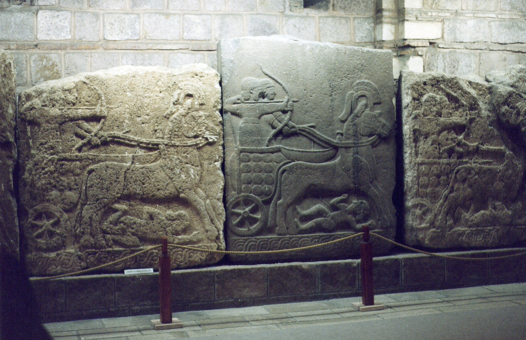 Museum für anatolische Zivilisationen, Ankara, Türkei Relief eines Streitwagens aus Kargamisch